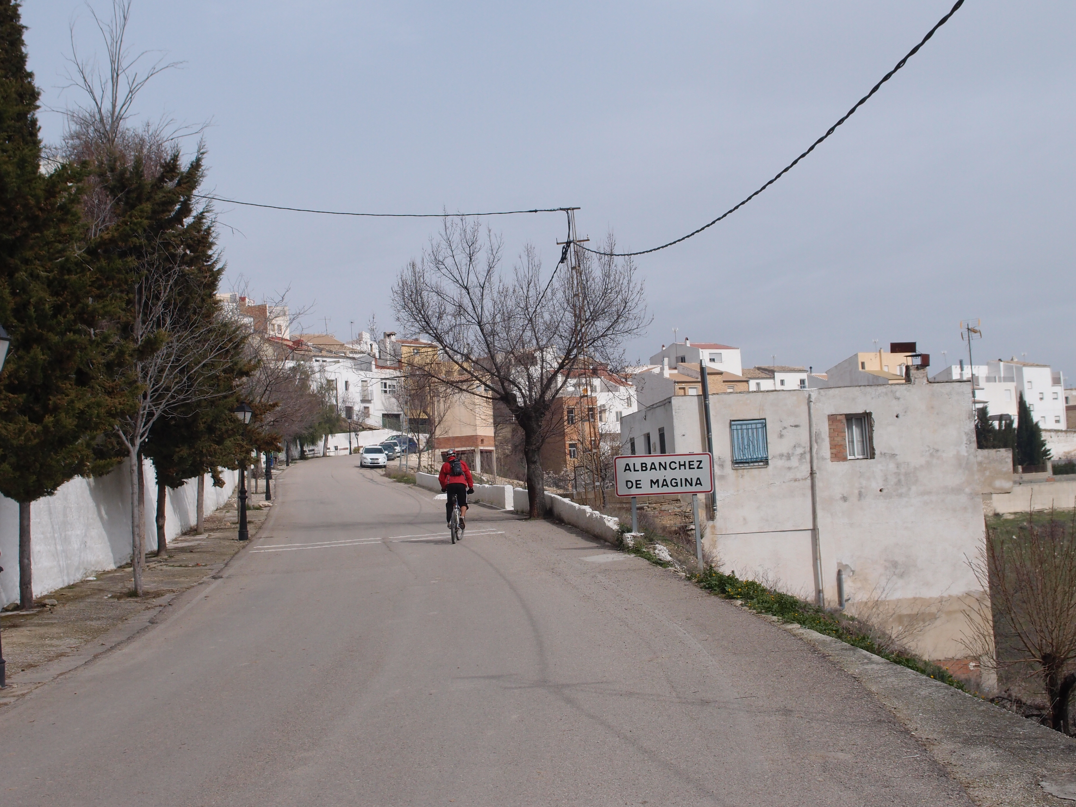 Entrada al pueblo de Albanchez de Mágina.